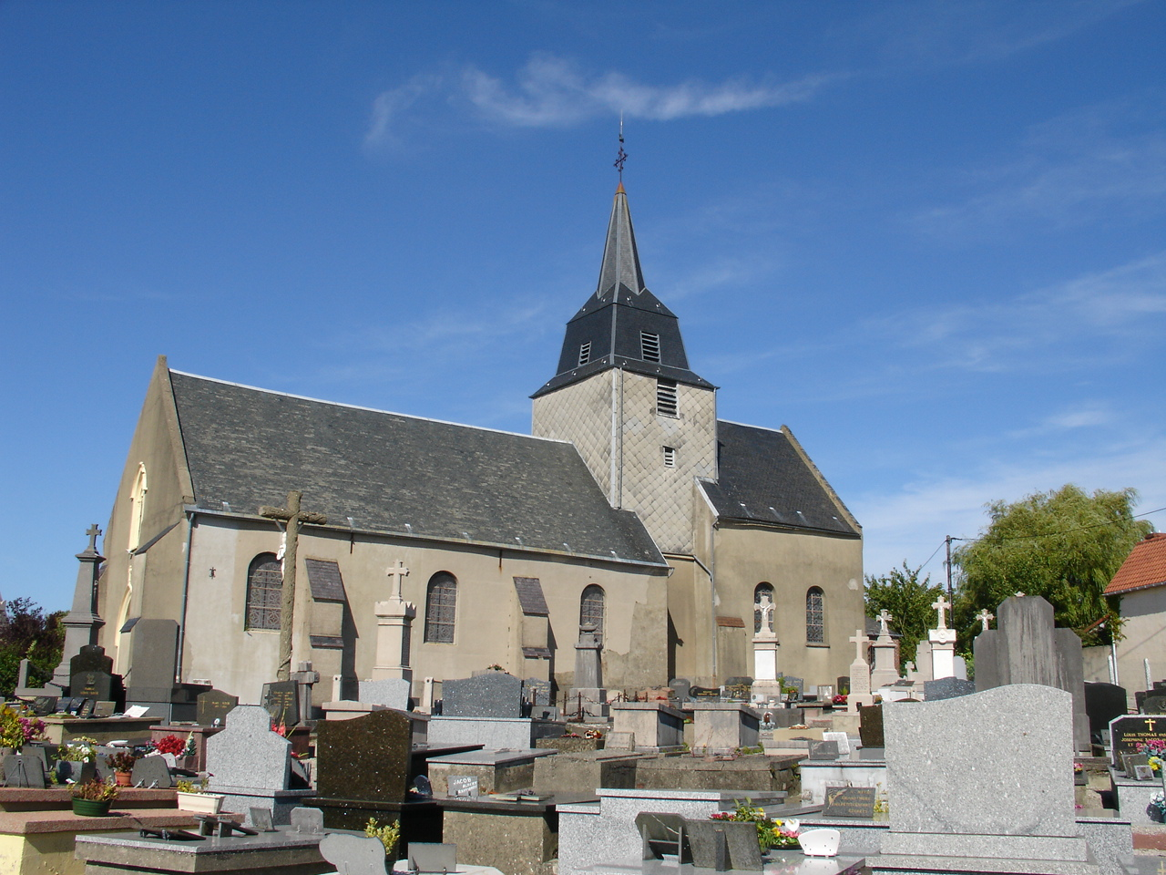 Église de Lottinghen (Église Saints-Fuscien-Gentien-et-Victoric)